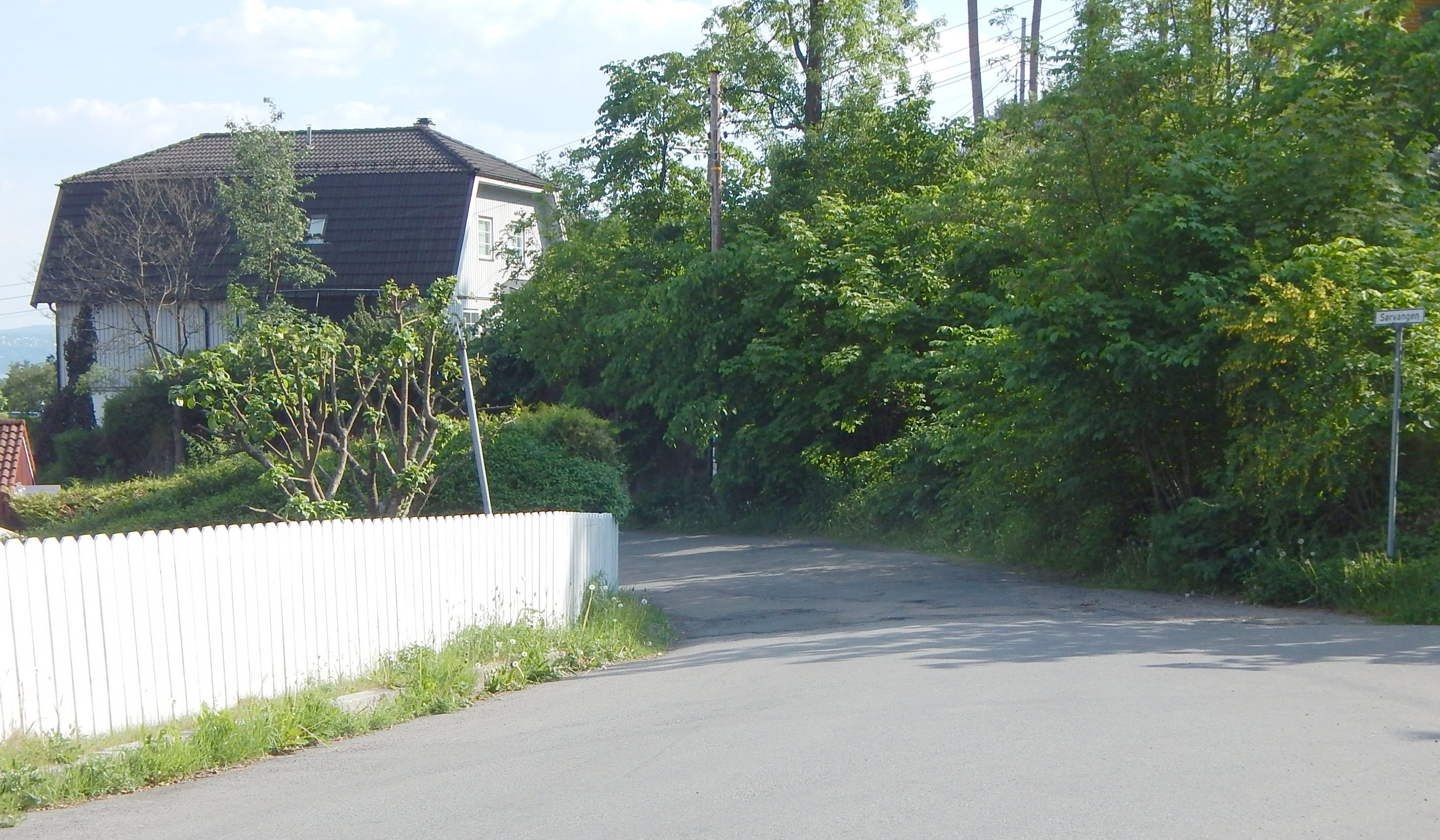 Sørvangen sett fra Vækerø terrasse